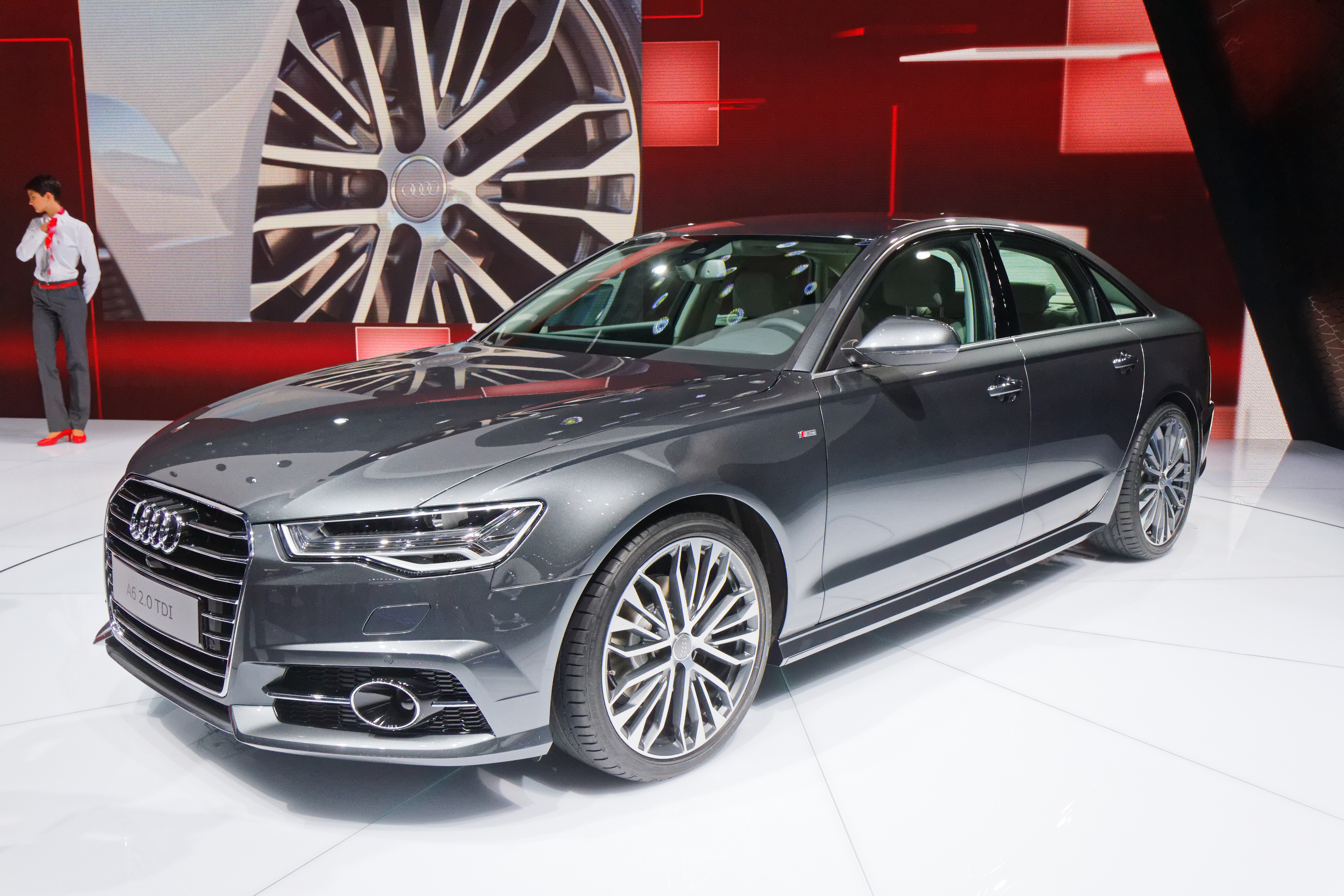 Une Audi A6 présentée lors du mondial de l'automobile de Paris 2014.